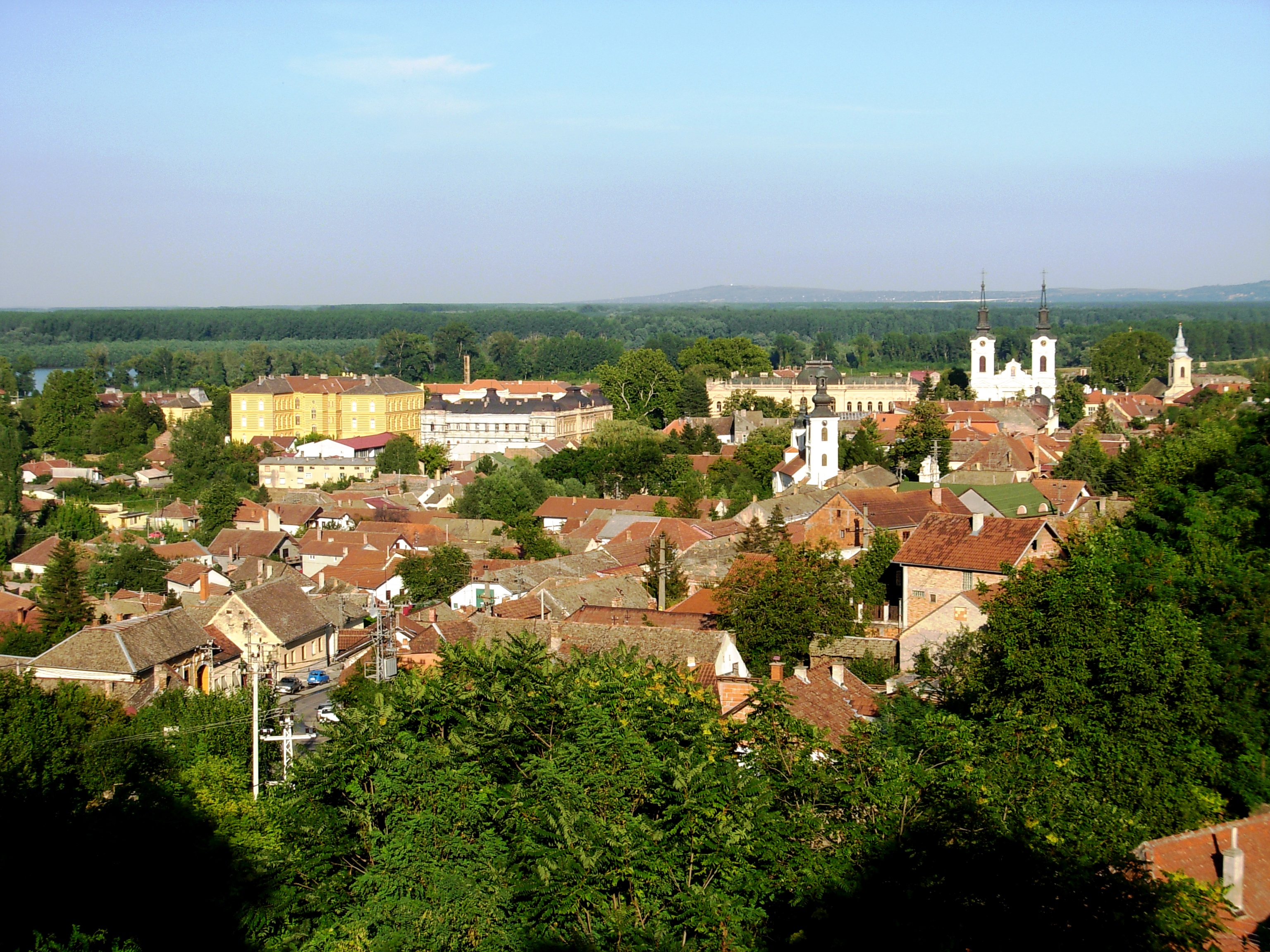 Pogled na Sremske Karlovce.